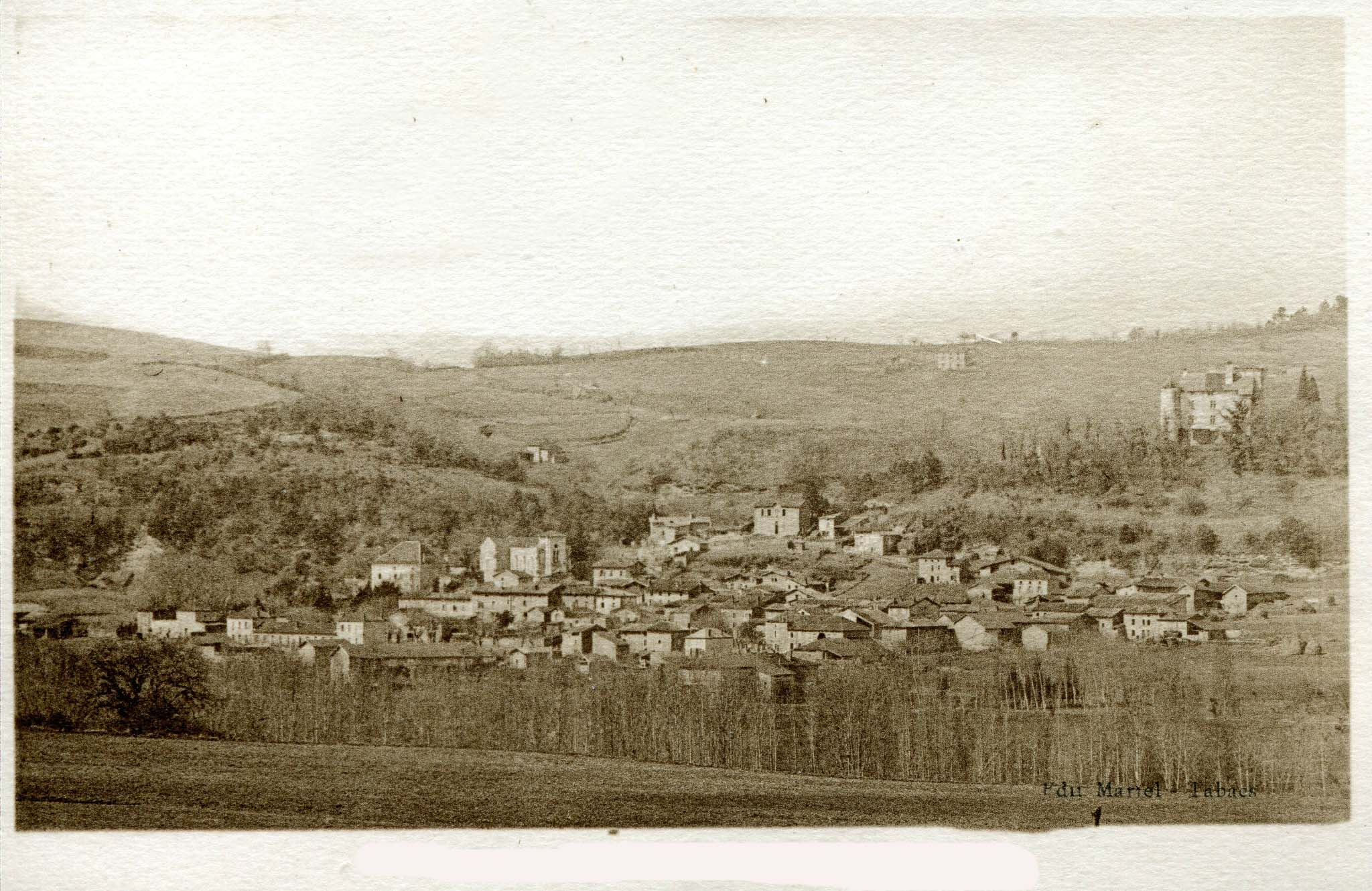 village ancien .